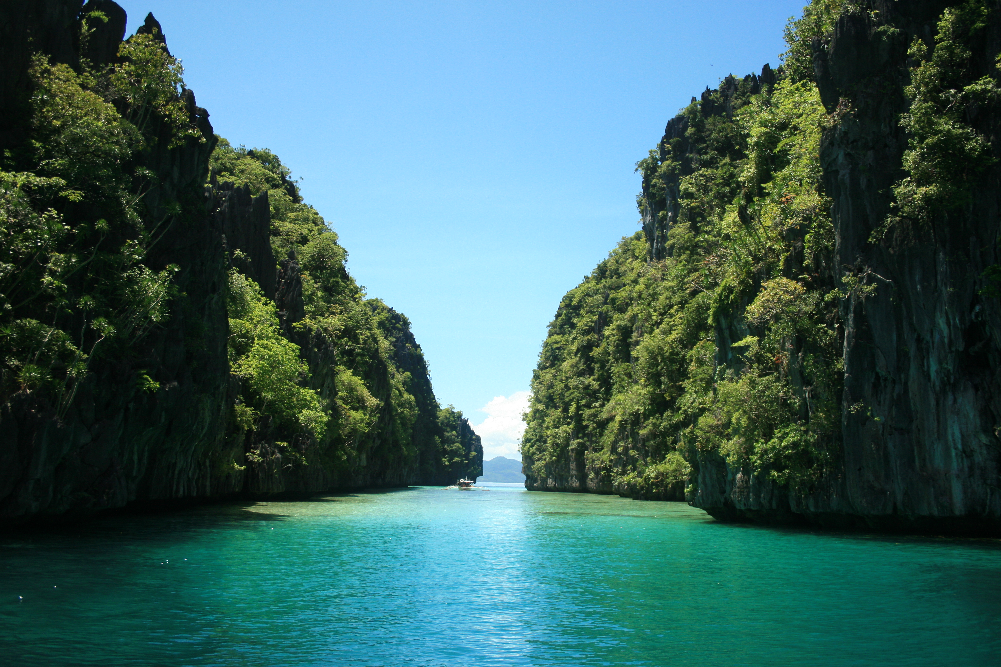 El Nido, Palawan